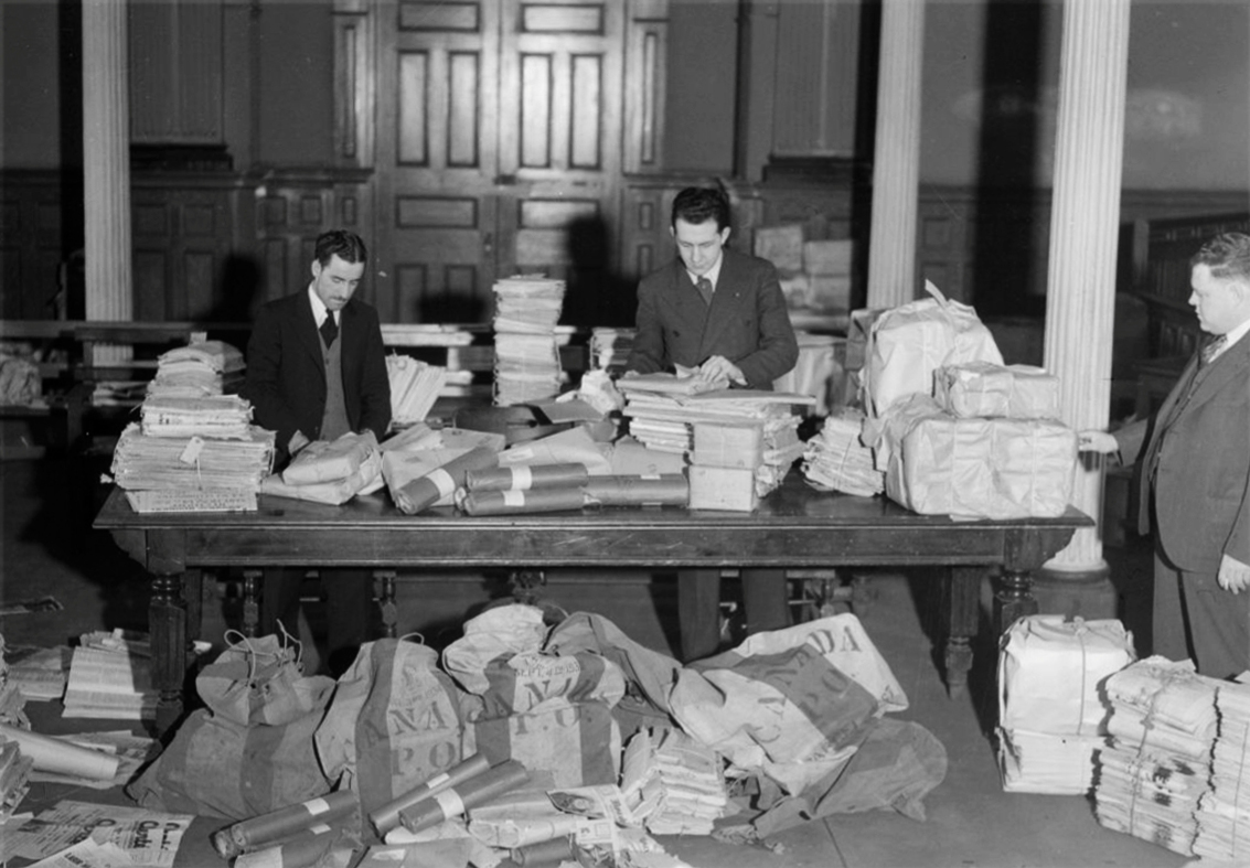 Coséquence de la Loi ddu Cadenas, documents d'allégence communiste saisis et exposés à Hôtel de ville de Montréal